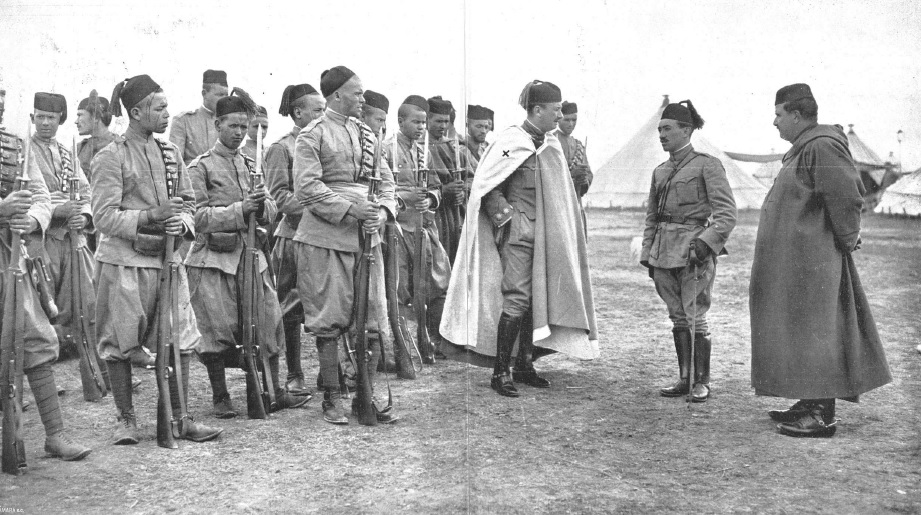 El coronel Berenguer y sus regulares en el campamento de Carabanchel, adonde habían acudido para la jura de bandera.